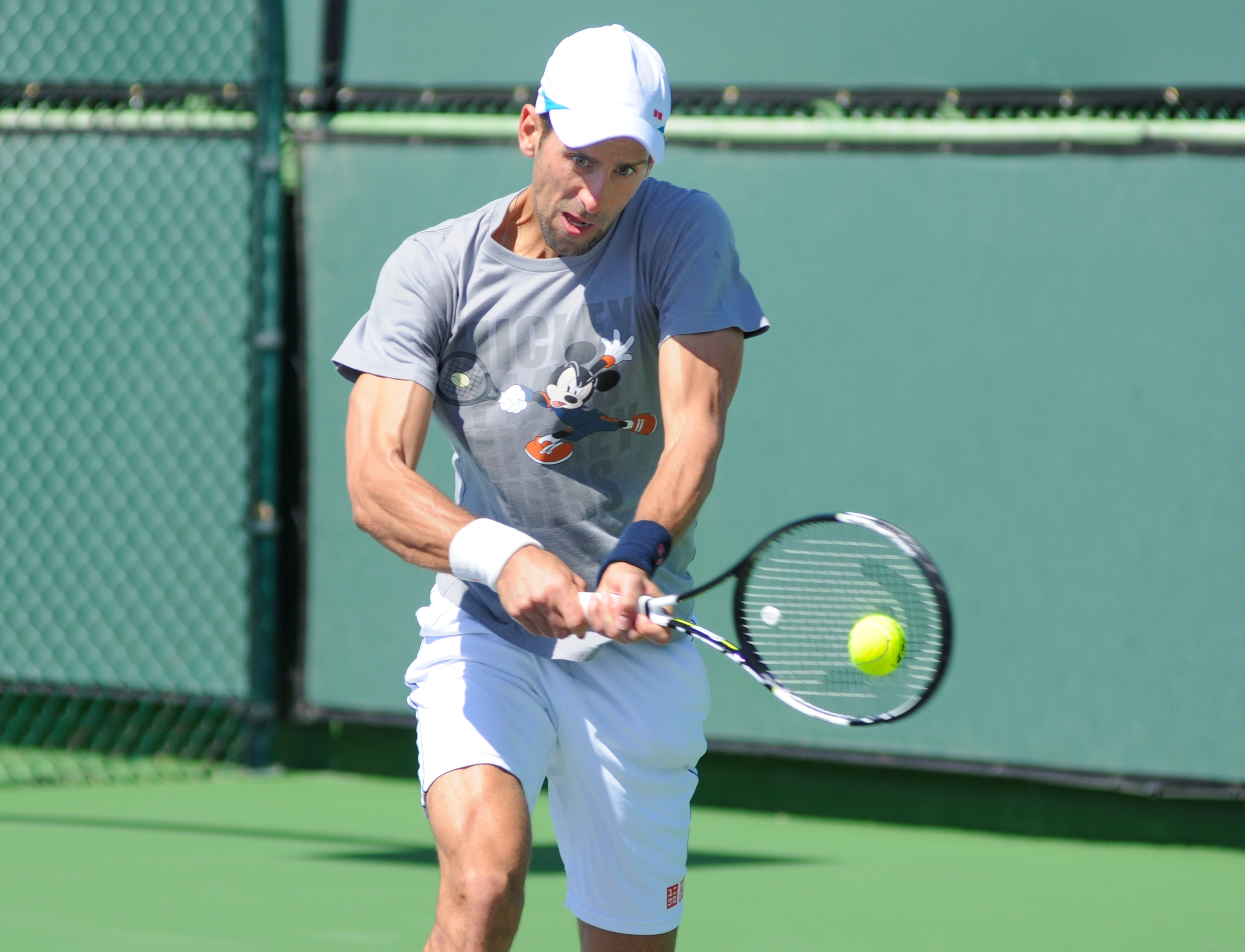 Novak Djokovic